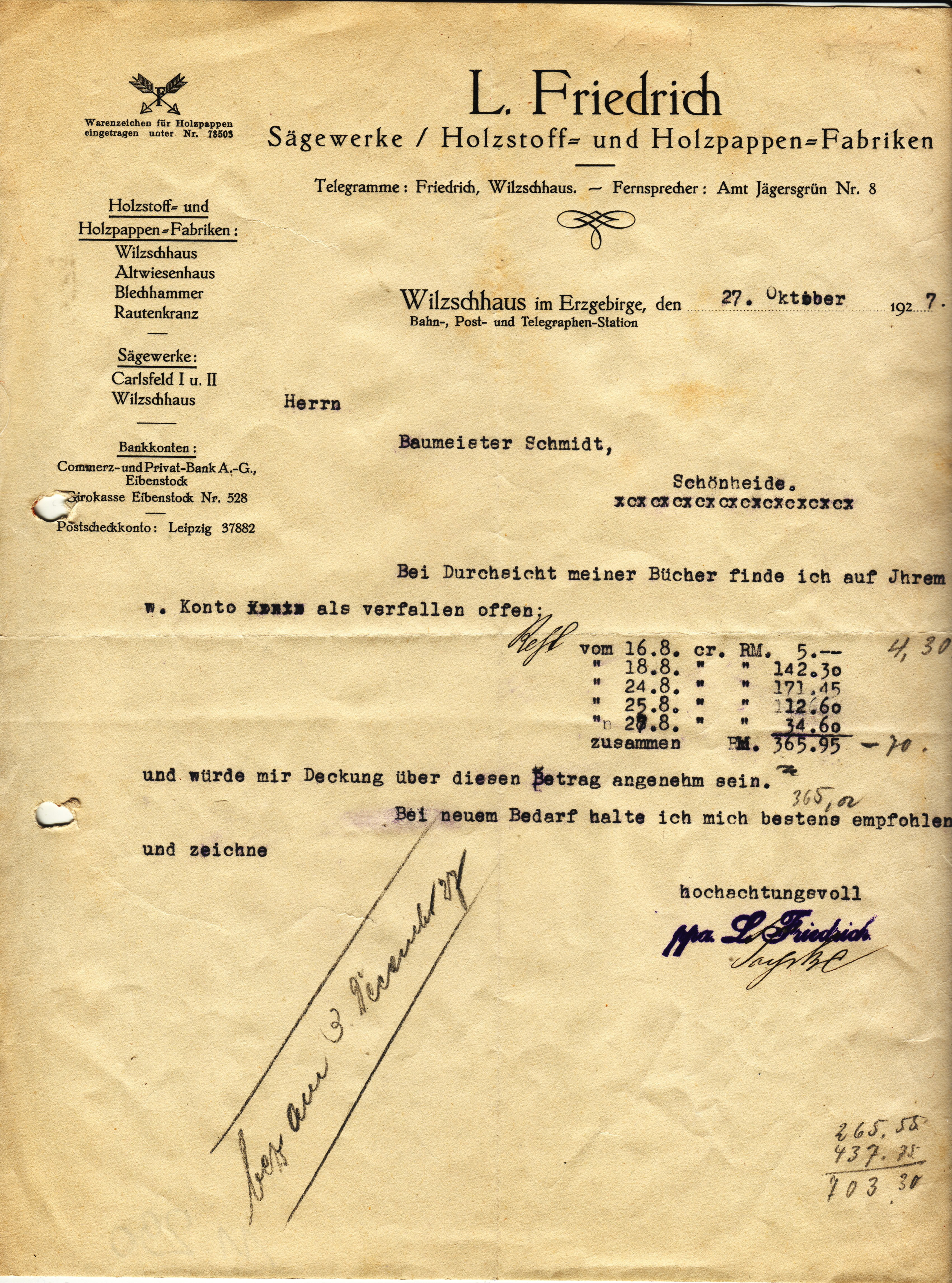 Zwickauer Mulde für die in der Mitte des 19. Jahrhunderts entwickelte Technik der Papierherstellung durch die Holzschifftechnik.